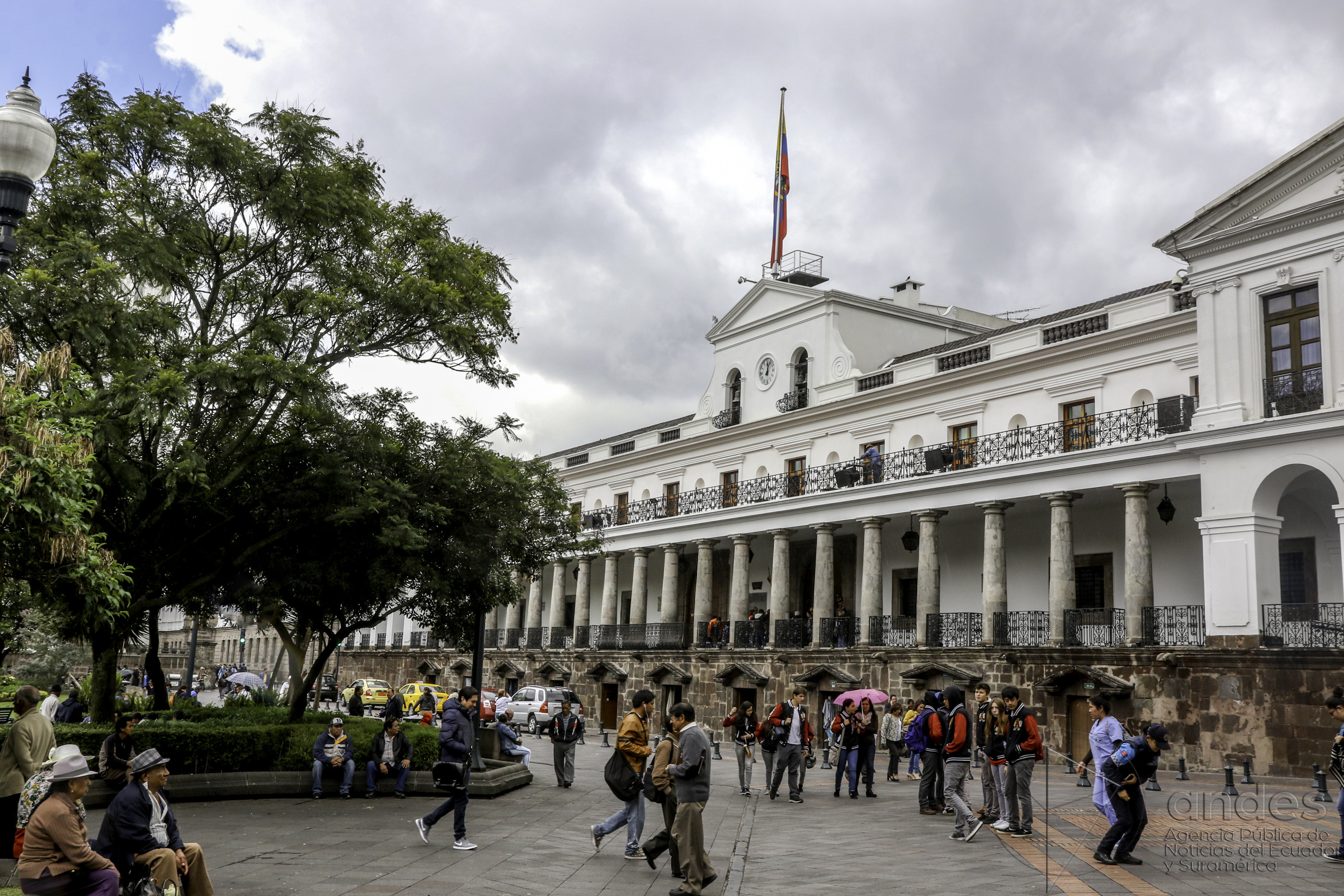 Quito, 10 ene 2017(Andes).- Fachada del Palacio de Carondelet sede de la presidencia de la República del Ecuador. ANDES/Micaela Ayala V.